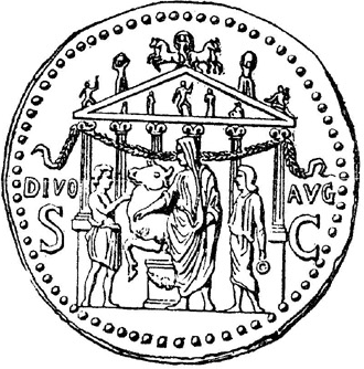 Libation pratiquée en même temps qu'on immolait une victime